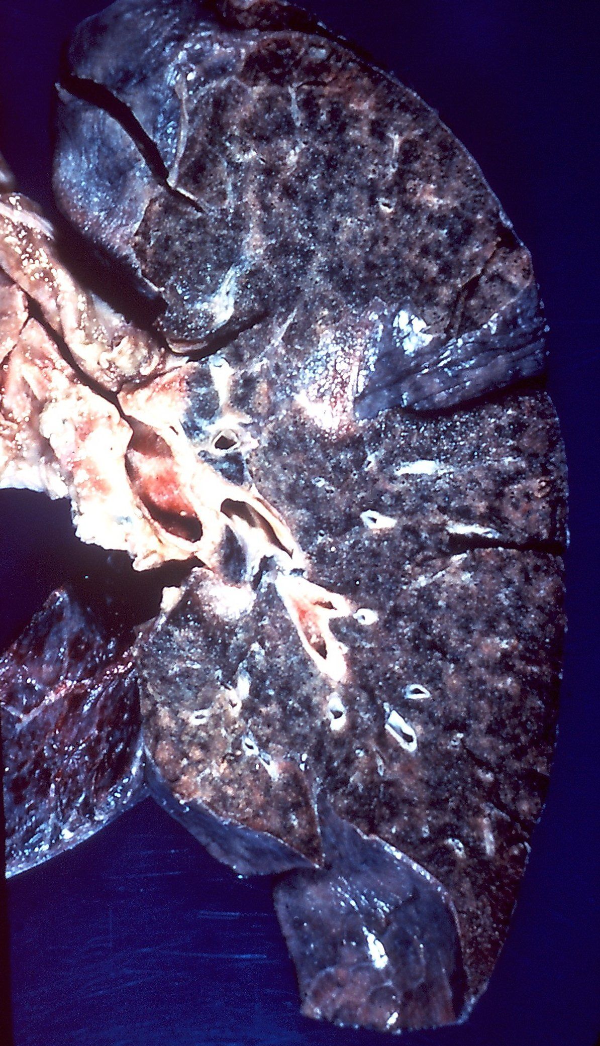 Toxoplasmosis